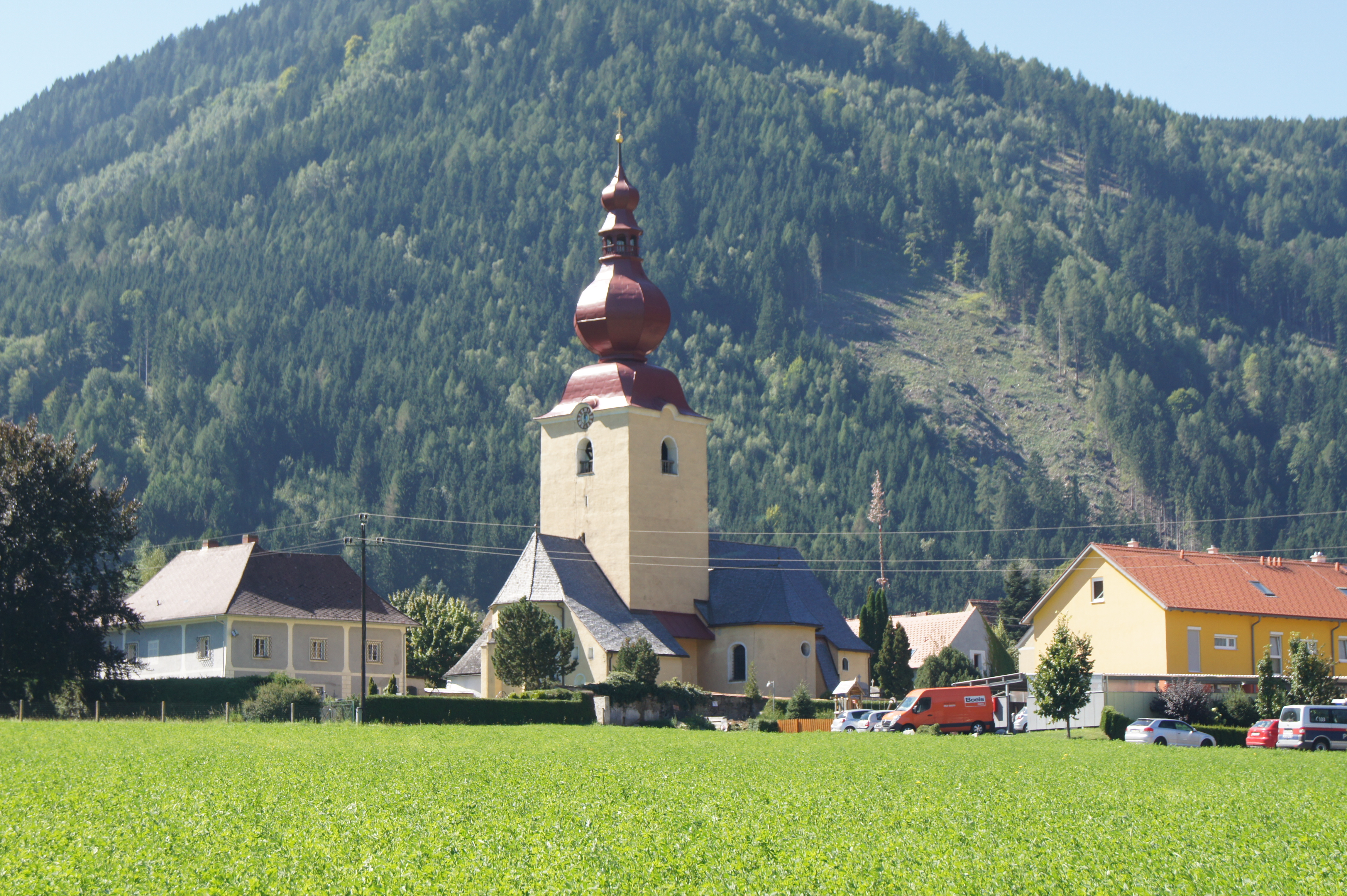 Kath. Pfarrkirche hl. Georg